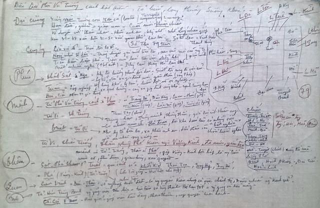 Comment HCM